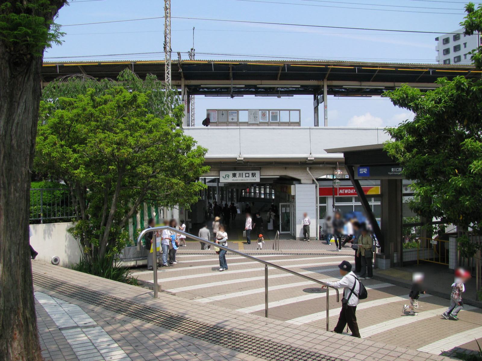 JR武蔵野線東川口駅